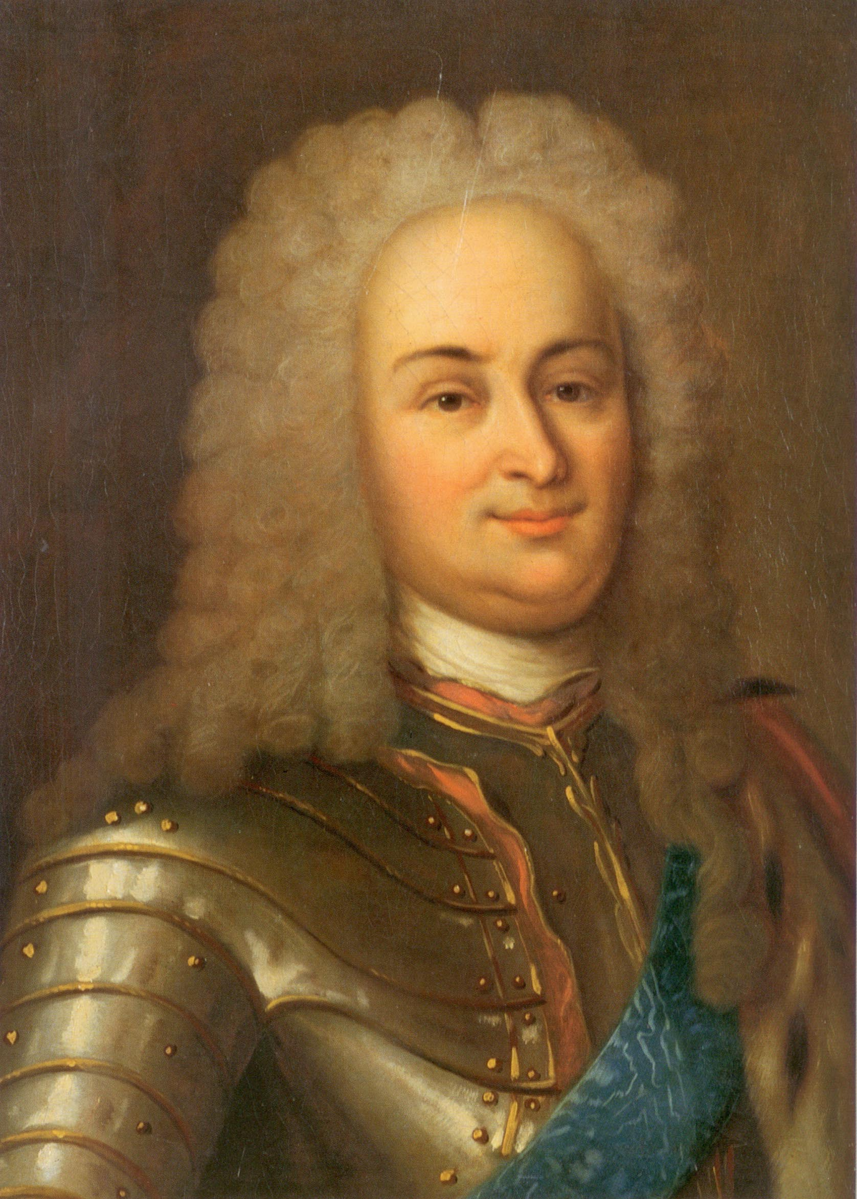 Репнин Аникита Никитич (1668-1726), генерал-фельдмаршал.